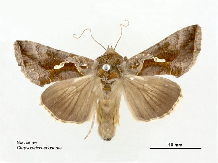 Chrysodeixis eriosoma dorsal view